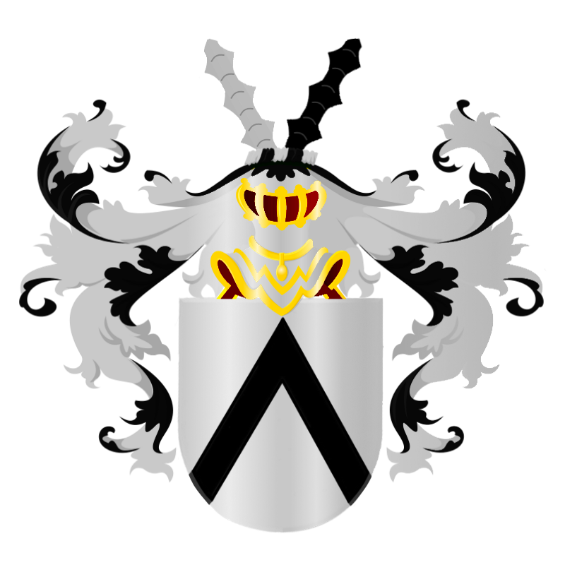 Een keper van sabel (zwart) op een velt van zilver met als helmteken twee afgekapte stokken. Waarvan de linker in zilver en de rechter in sabel.